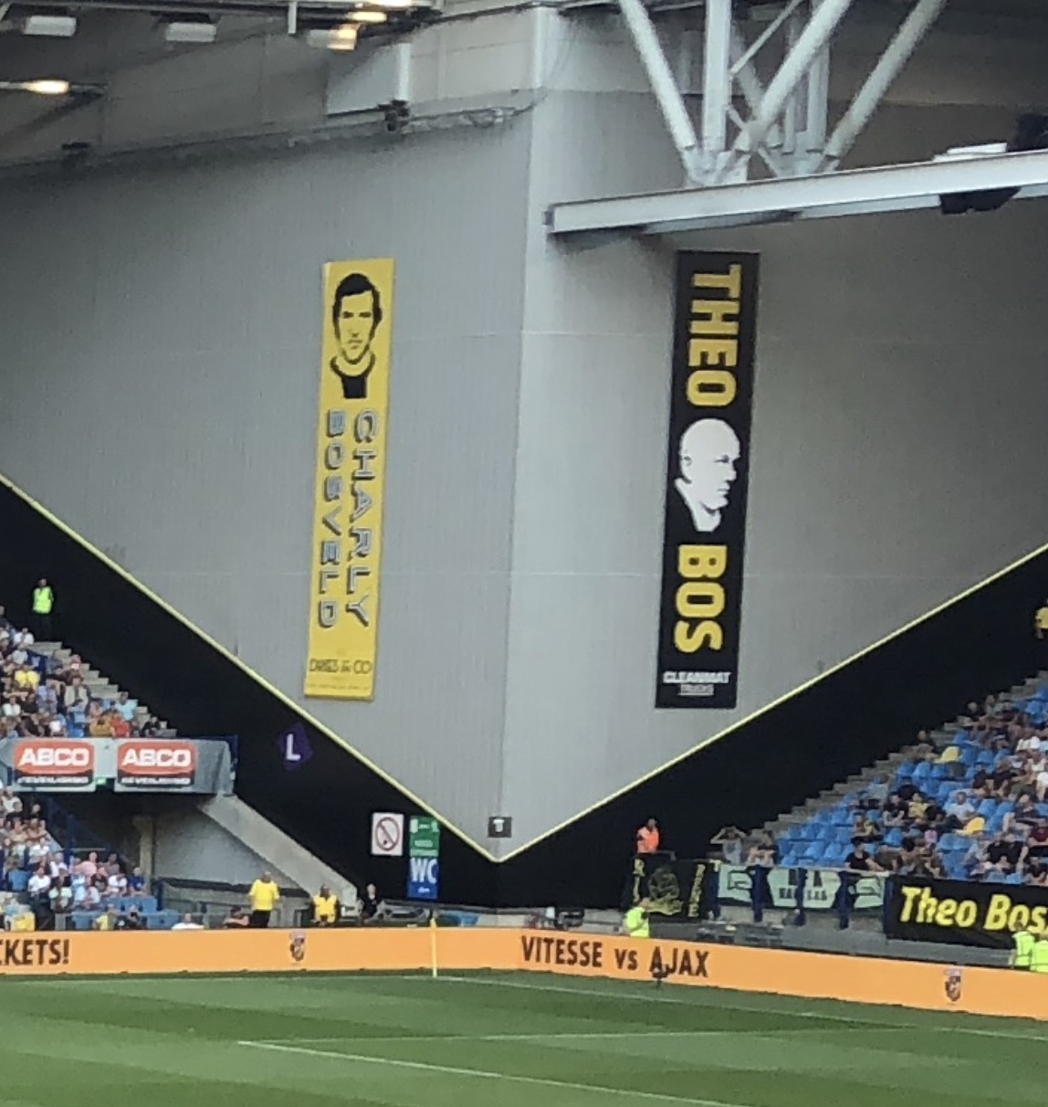 Theo en Charly tribune in GelreDome